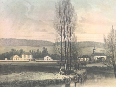 Walferdange